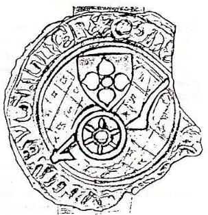 Afdruk oud schepenzegel 1348 polderbestuur Rosmalen, van de site NGW.nl.